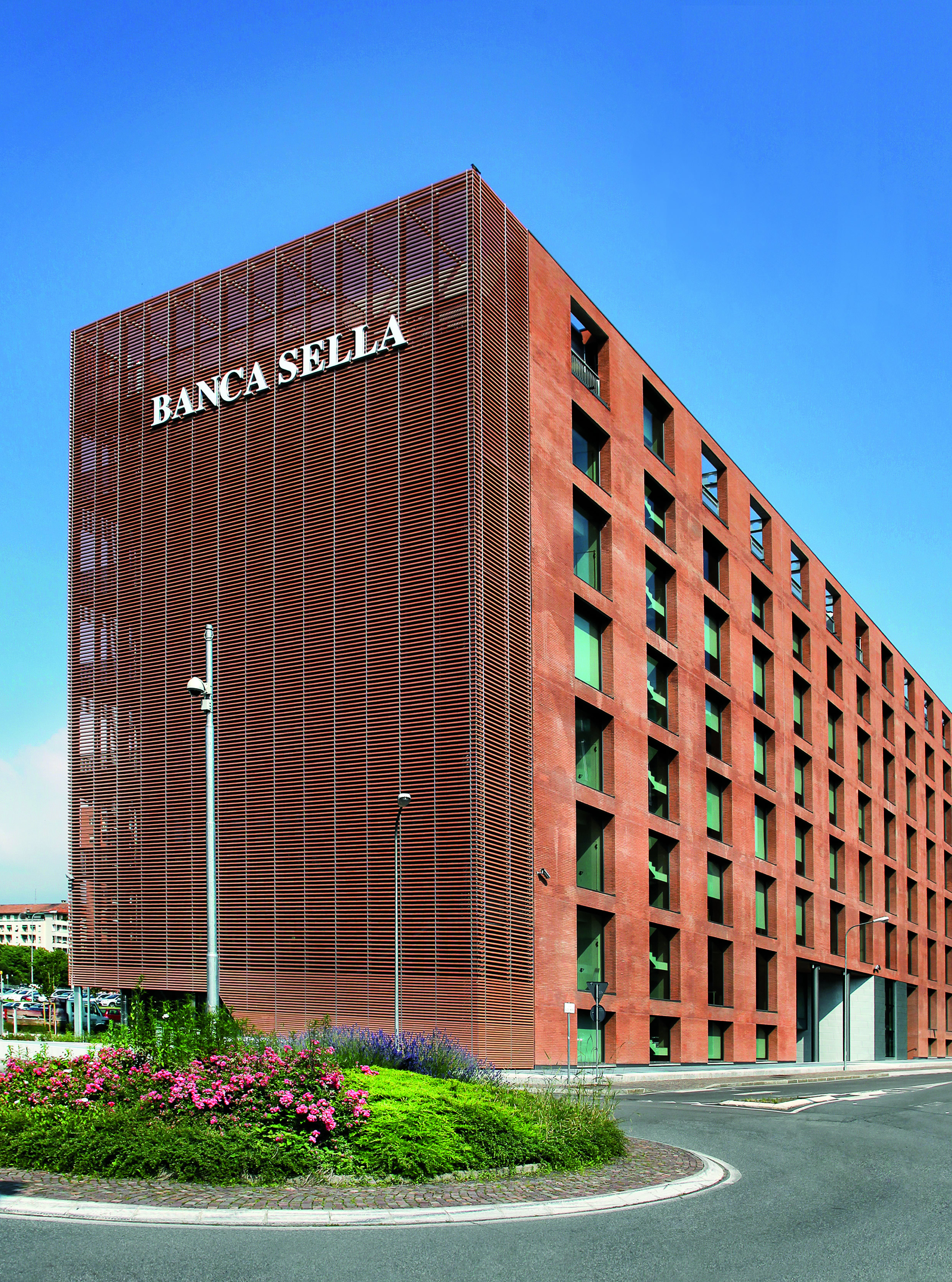 Sede Banca Sella, sita in Piazza Gaudenzio Sella 1 a Biella (Italia)